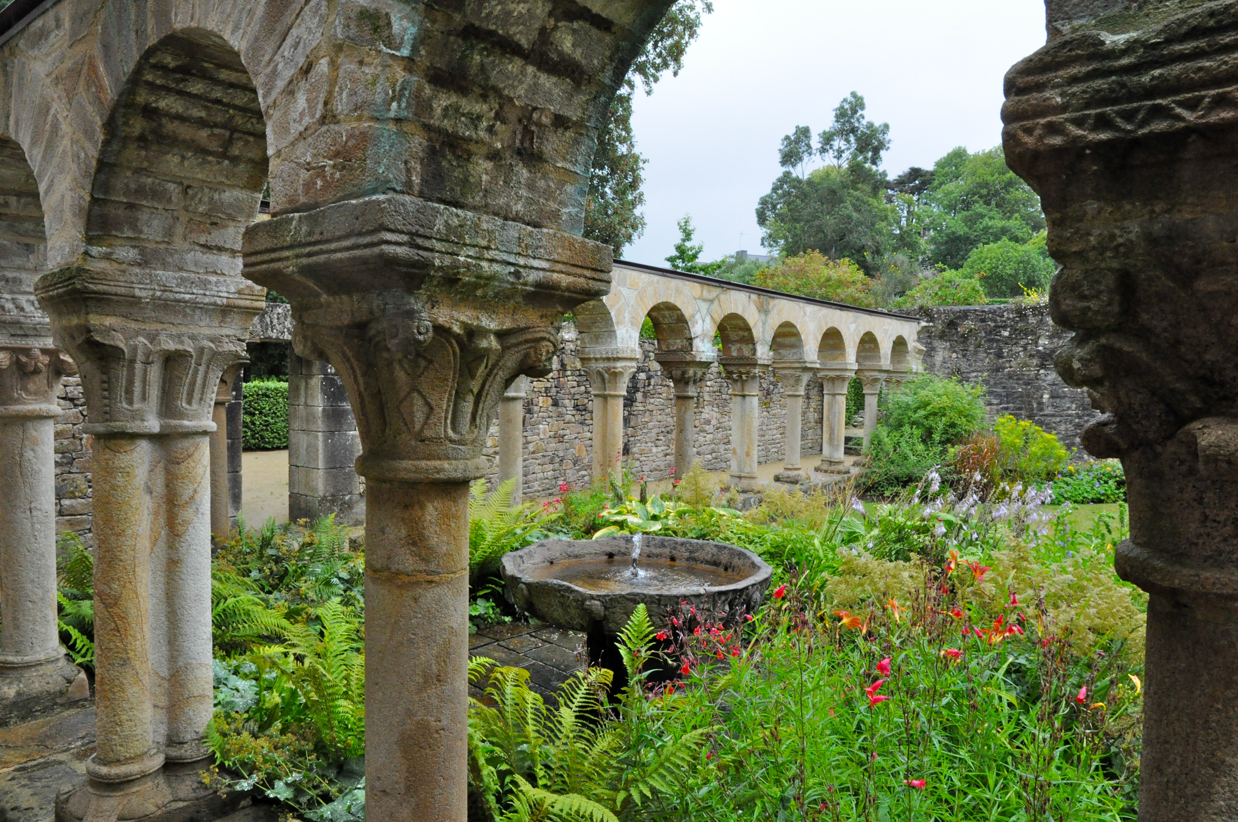 Le cloître Roman de l'Abbaye de DAOULAS.